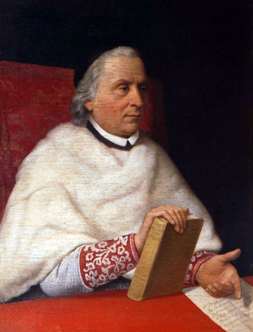 Marini Antonio (1852), Ritratto del canonico Giovan Battista Casotti Il canonico è ritratto a mezzo busto seduto ad un tavolo coperto di panno rosso; indossa gli abiti canonicali, cappa magna, roccetto e zucchetto; tiene con la destra un libro e con l'altra indica il foglio del suo testamento